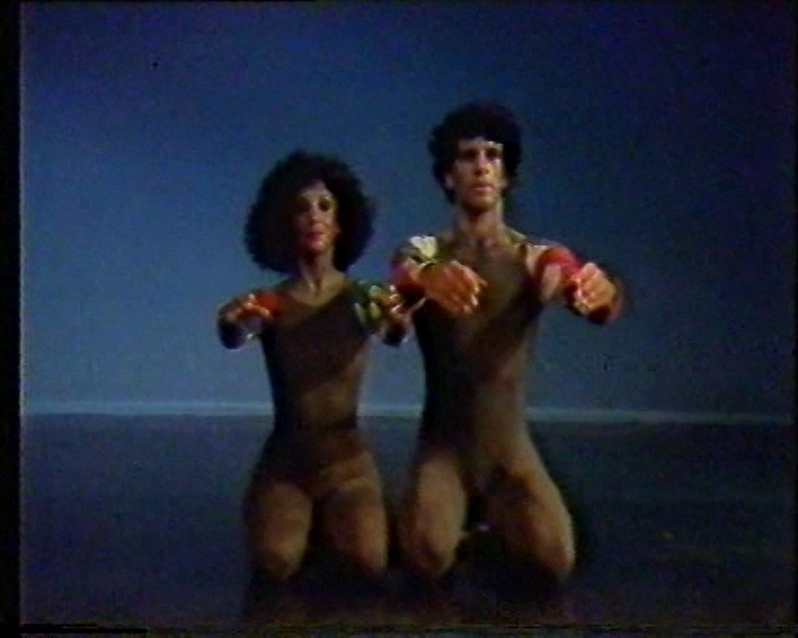 המחול אנדרטה מאת רונית לוי וייס